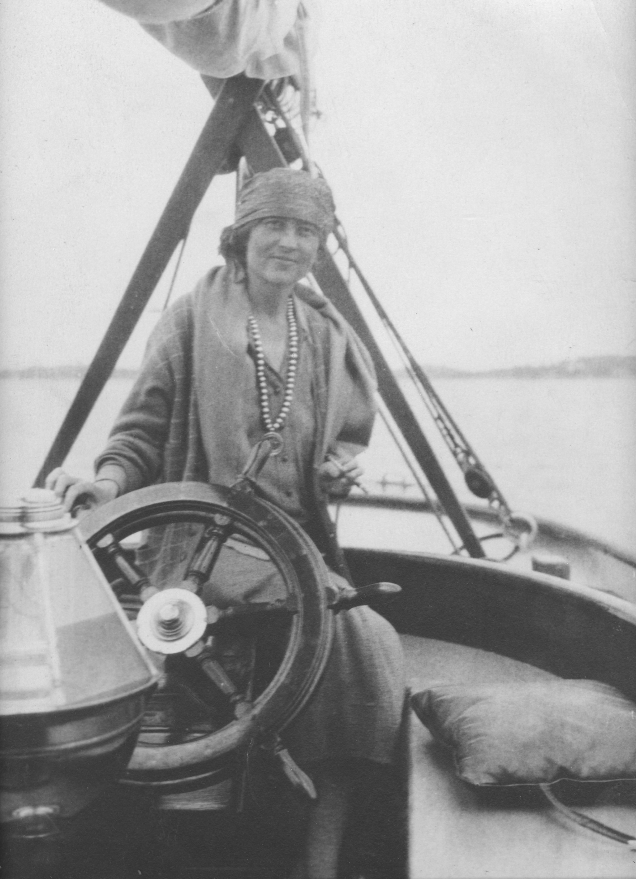 Elsie Clews Parsons aboard Malabar V